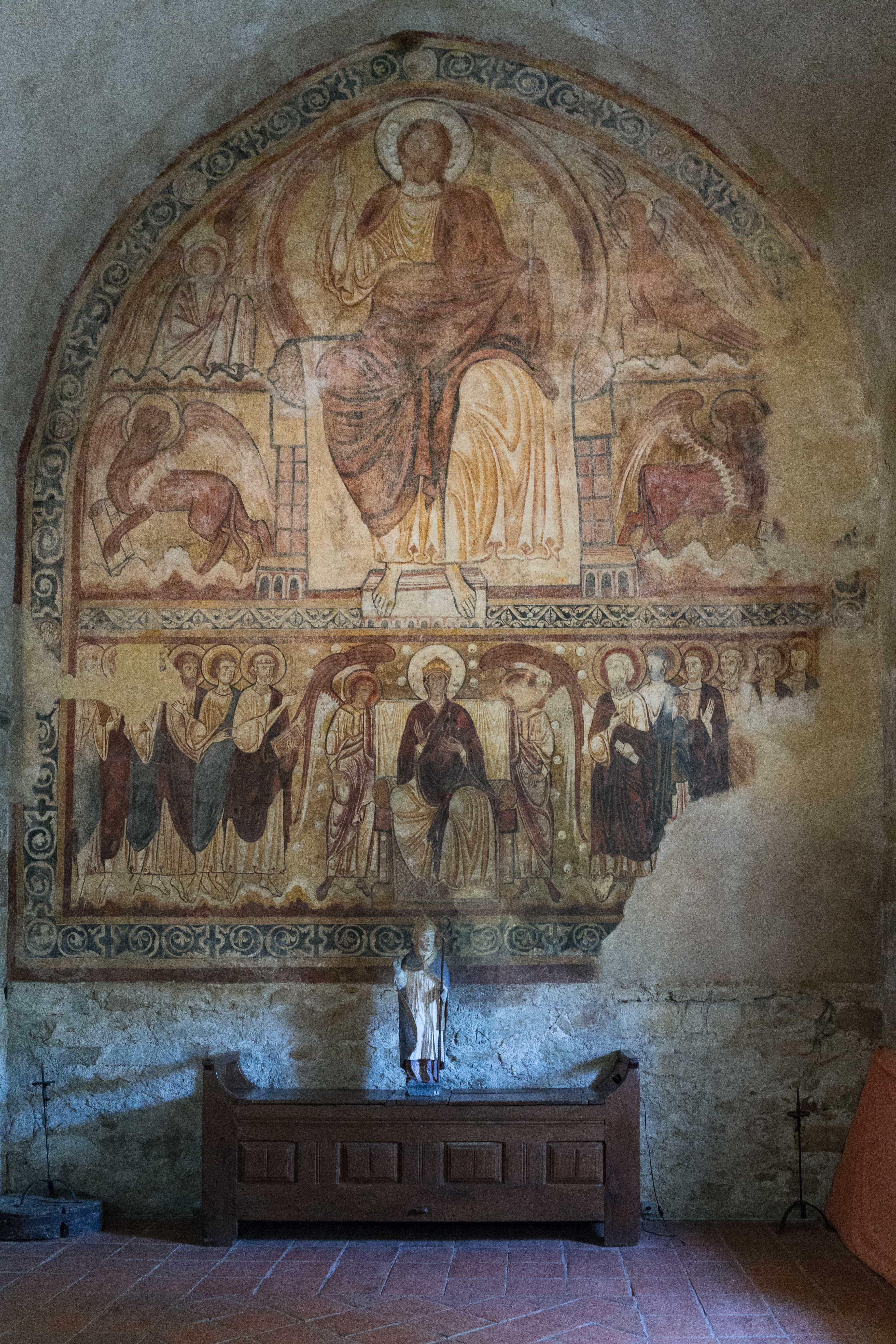 Fresque du réfectoire de l'abbaye Saint-André de Lavaudieu.